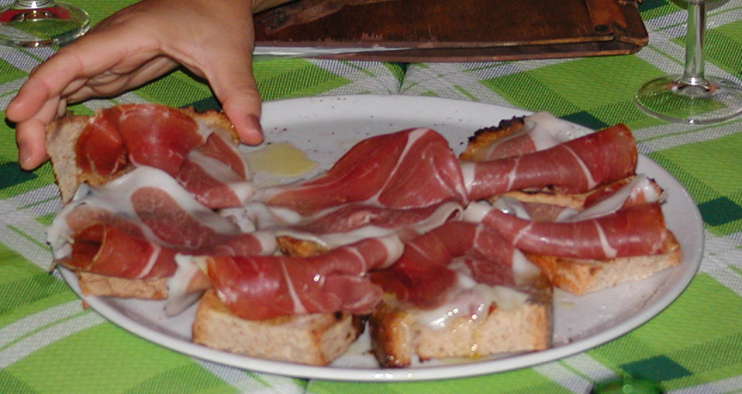 Bruschetta mit Öl und Schinken